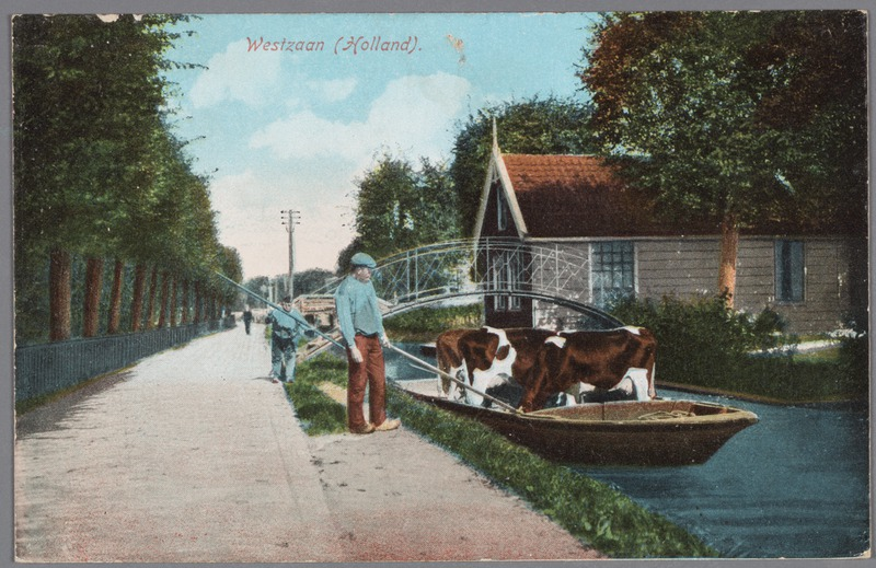 praam